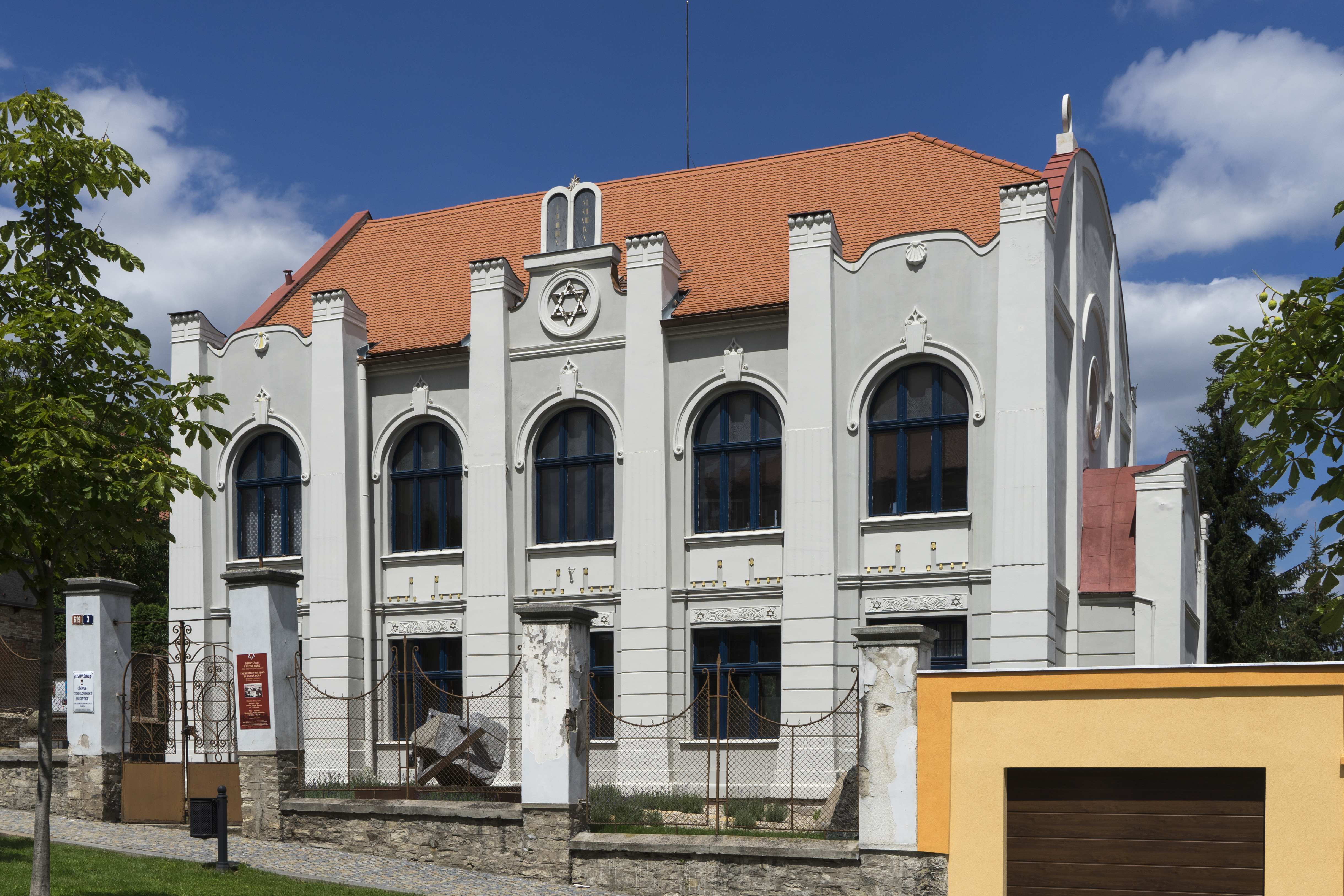 Synagoge, Kutna Hora